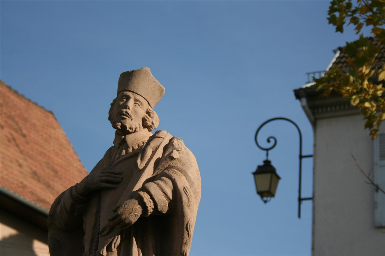 Fontaine Saint Jean Népomucène, Rixheim, Alsace, France